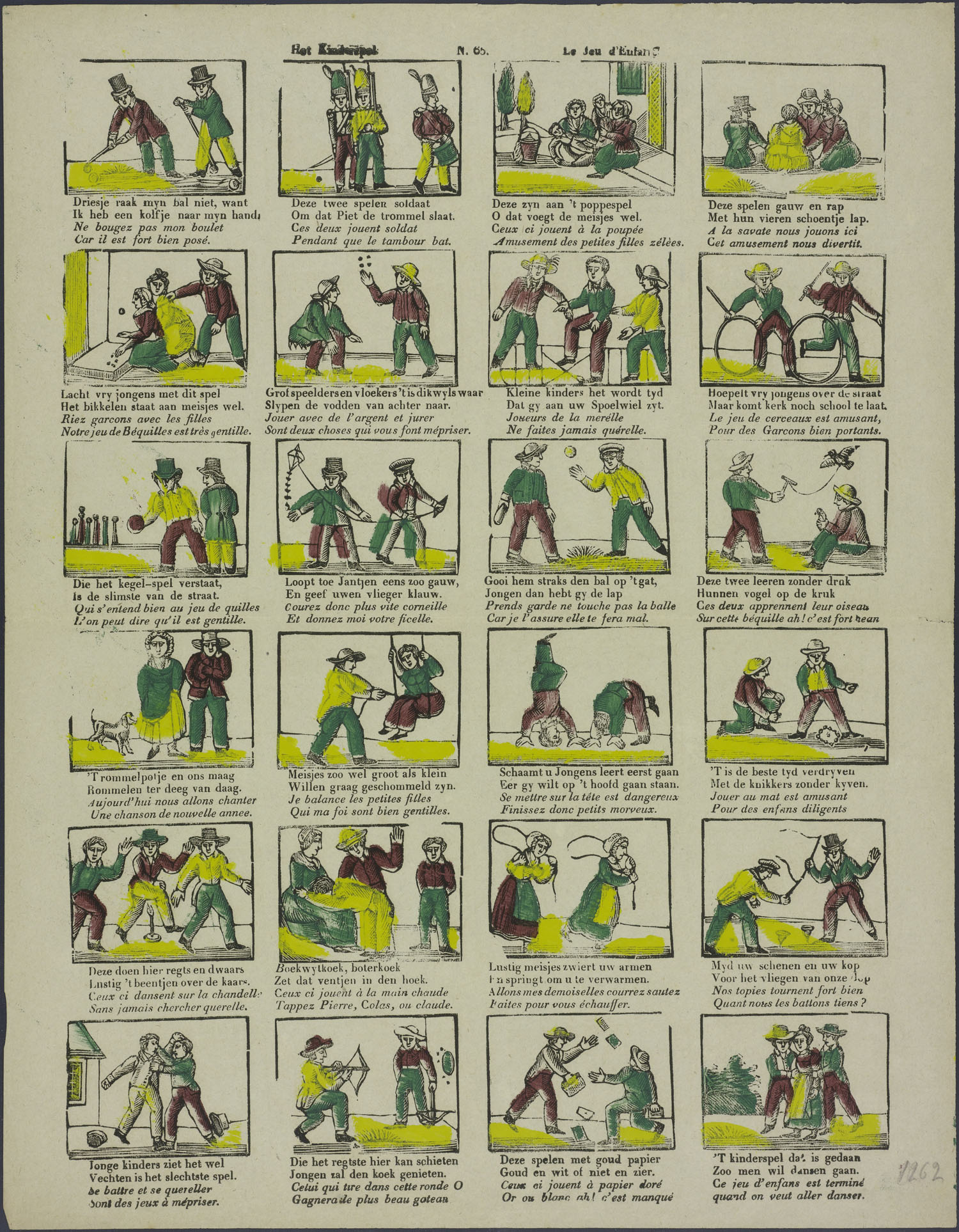 Centsprent met 6 x 4 houtsneden met afbeeldingen van het spelen van het kolfspel, soldaatje, met poppen, 'schoentje lap', spelen om geld en vloeken, met een 'spoelwiel', hoepelen, kegelen, vliegeren, ballen, met de vogel op de kruk, zingen met de rommelpot, schommelen, op het hoofd staan, knikkeren, over een kaars springen, billenkoek, touwtje springen, tollen, vechten, boogschieten, spelen met goudpapier, dansen. Met tweeregelige rijmende onderschriften in Nederlands en Frans.